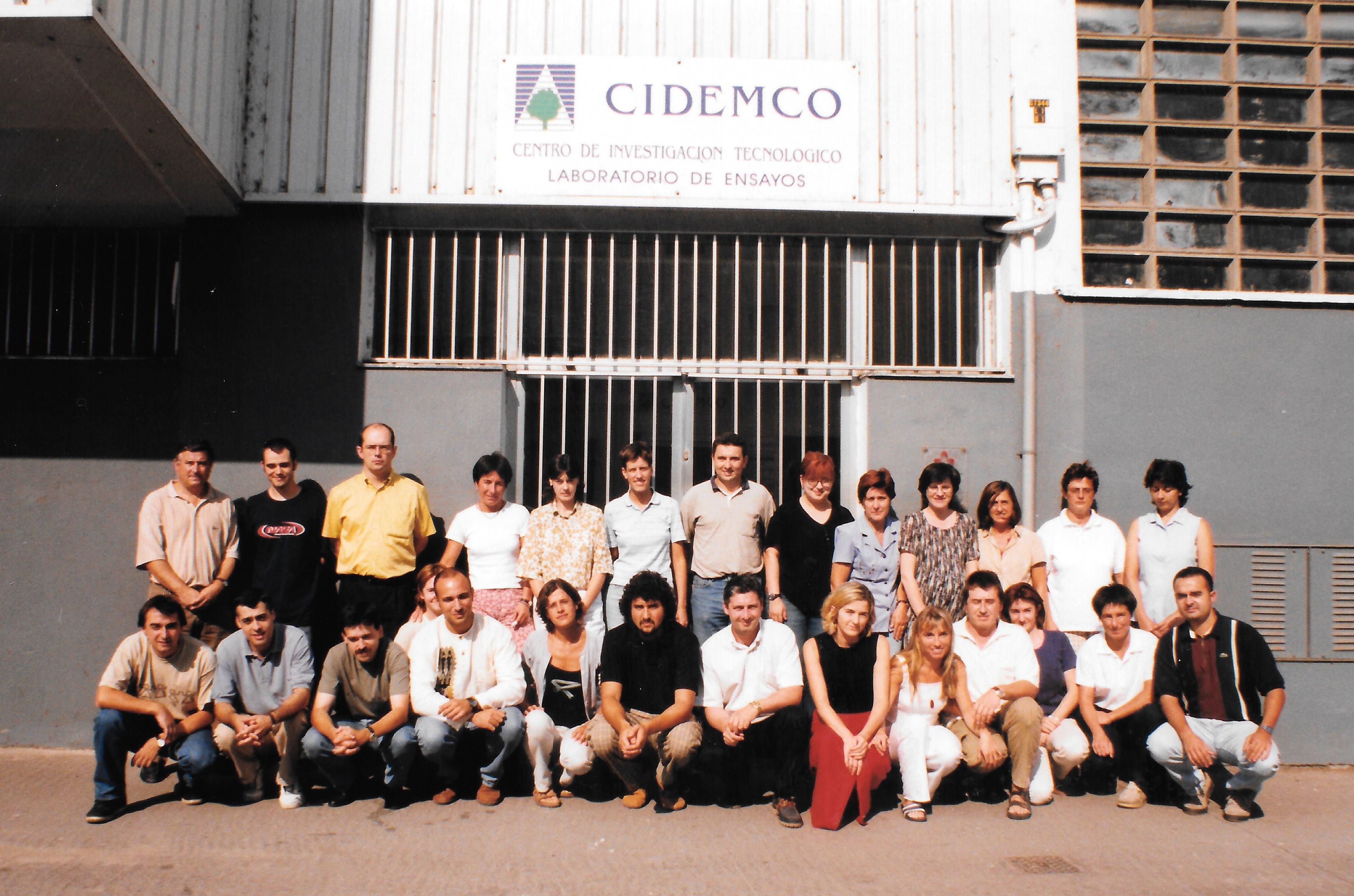 Personal antes del traslado a la nueva sede de Cidemco